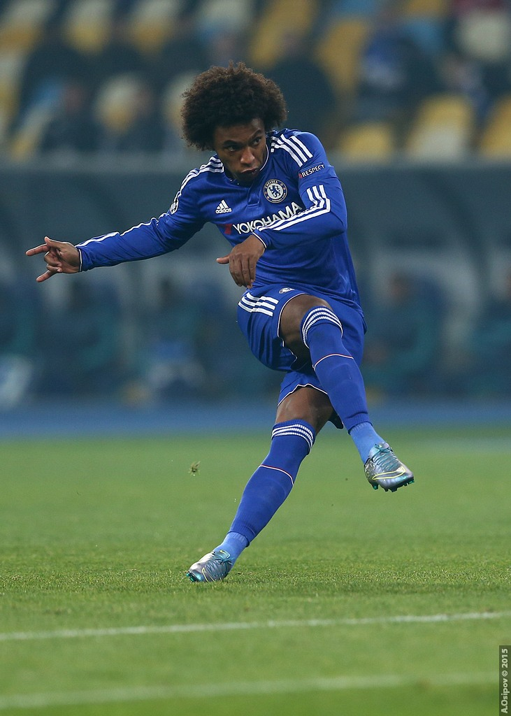 20.10.2015 Kyiv, Olimpiyskiy National Sports Complex Champions League. Group stage. FC Dynamo Kyiv - Chelsea - 0:0 Chelsea (4-2-3-1): Begovic; Zouma, Cahill, JT (c), Azpilicueta; Ramires, Matic; Willian, Fabregas (Oscar 75), Hazard; Diego Costa. Unused subs Blackman, Baba, Mikel, Traore, Kenedy, Falcao. Booked Zouma 67 Dynamo Kiev (4-1-4-1): Shovkovskiy; Danilo Silva, Khacheridi, Dragovic, Vida; Rybalka; Yarmolenko, Sydorchuk, Buyalskiy (Garmesh 83), Gonzalez; Kravets (Junior Moraes 78). Unused subs Rybka, Antunes, Petrovic, Gusev, Miguel Veloso. Booked Buyalskiy 65 20.10.2015 г.Киев. НСК "Олимпийский". Лига Чемпионов. Групповой этап Динамо — Челси 0:0 Динамо: Шовковский — Данило Силва, Драгович, Хачериди, Вида — Рыбалка, Буяльский (Гармаш, 83) — Ярмоленко, Сидорчук, Гонсалес — Кравец (Мораес, 78) Челси: Бегович — Аспиликуэта, Терри, Кэхилл, Зума — Матич, Рамирес — Виллиан, Фабрегас (Оскар, 75), Азар — Д. Коста Предупреждения: Буяльский — Зума